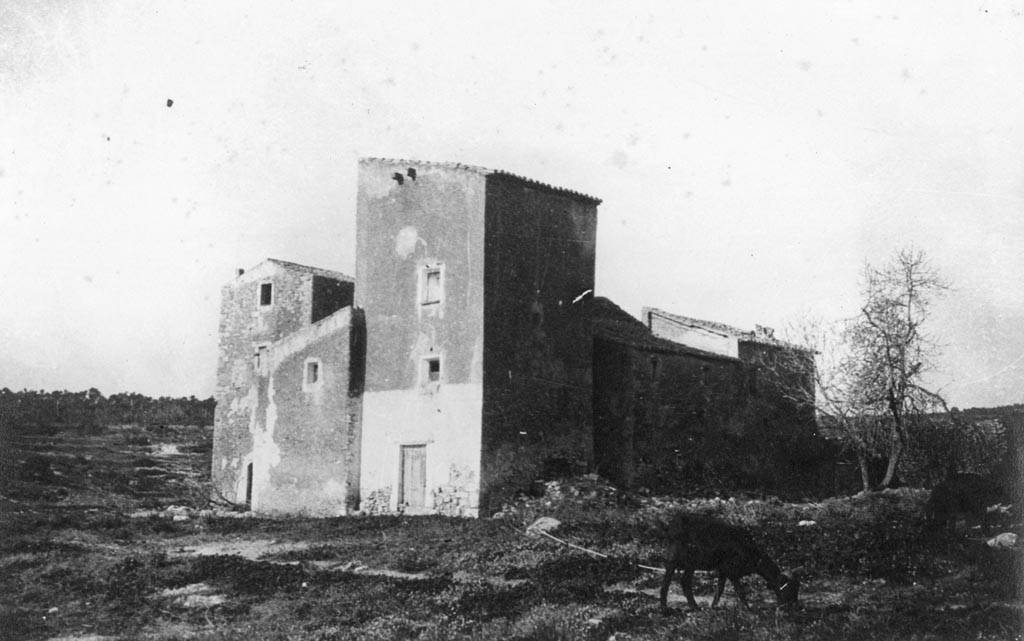 Torre del mas del Hereuet a Monnars. Jordi Audet i Viñals (1927-02)